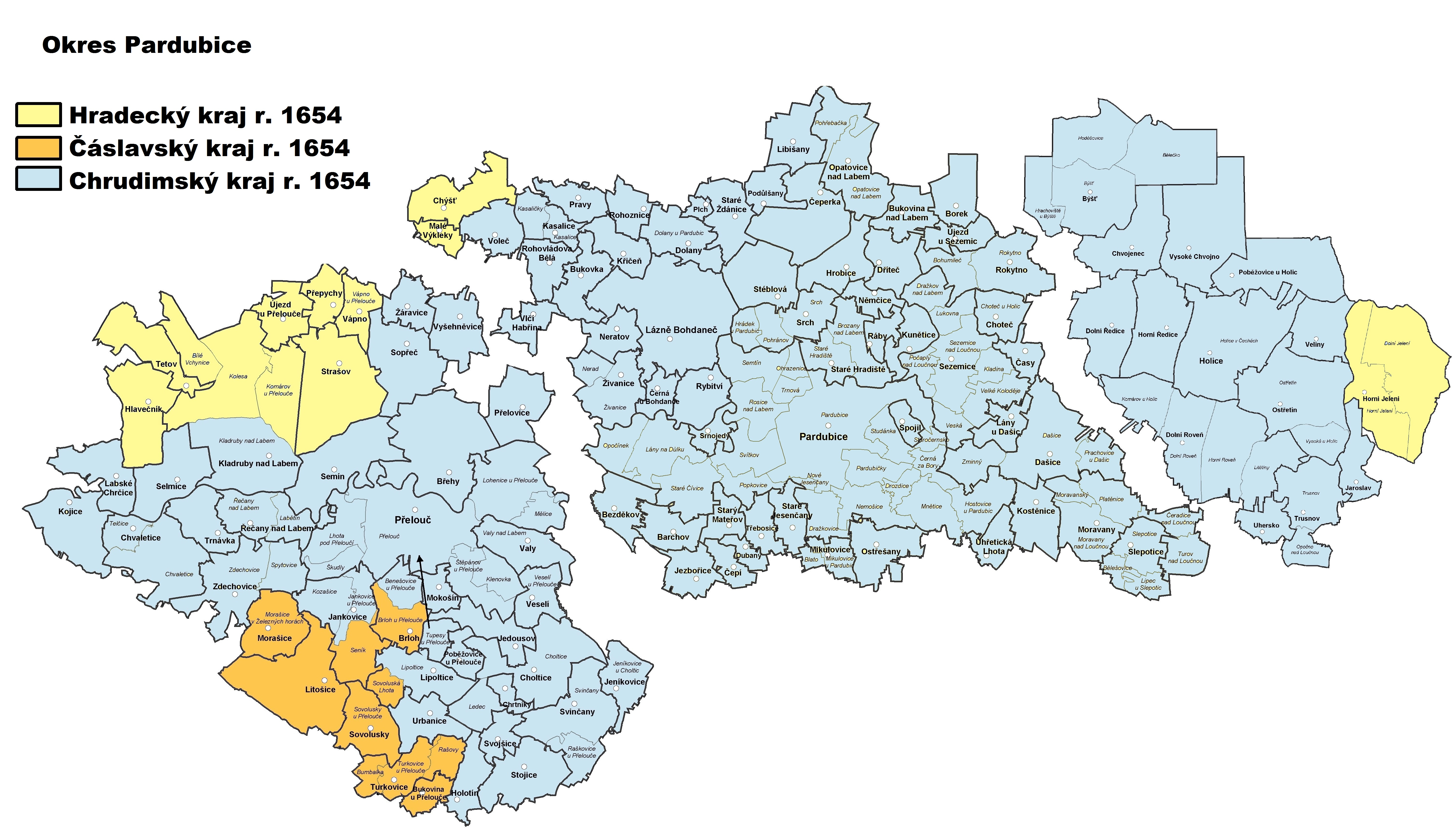 Čáslavský kraj r. 1654 v dnešním okrese Pardubice